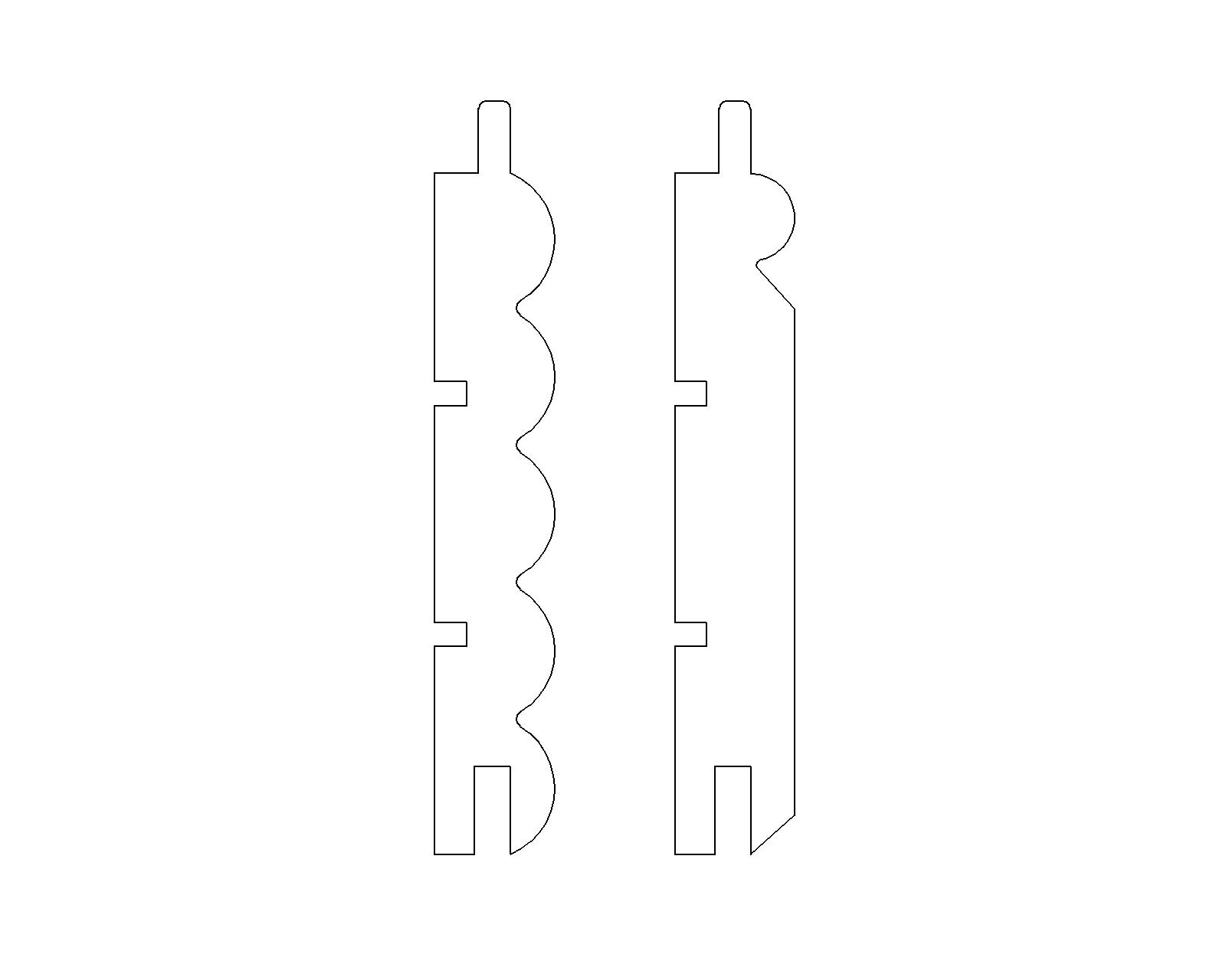 Helmi- ja 5-sorminen paneeli.